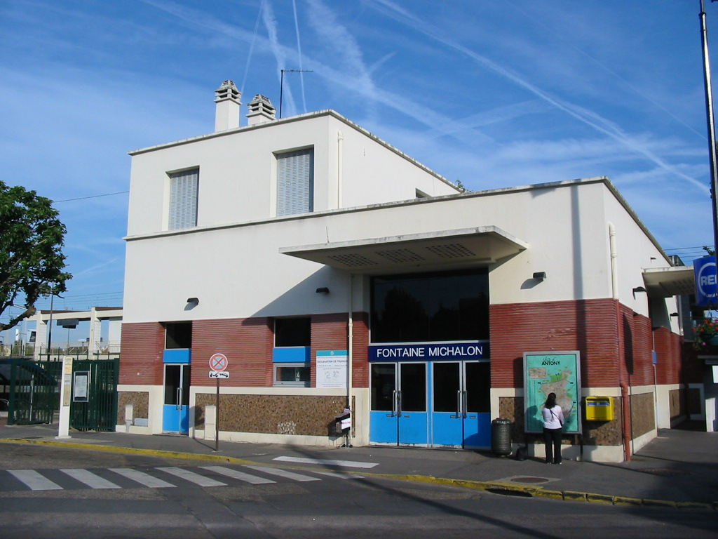 Gare de Fontaine Michalon, RER B, France